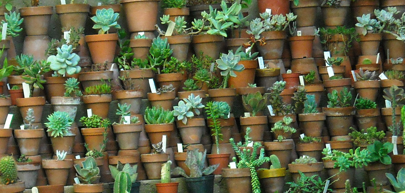 Ce l'ho... mi manca.... ce l'ho... mi manca!